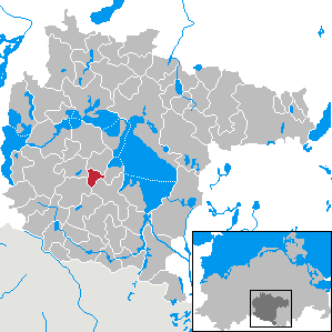 Groß Kelle in Mecklenburg-Western Pomerania - District Müritz